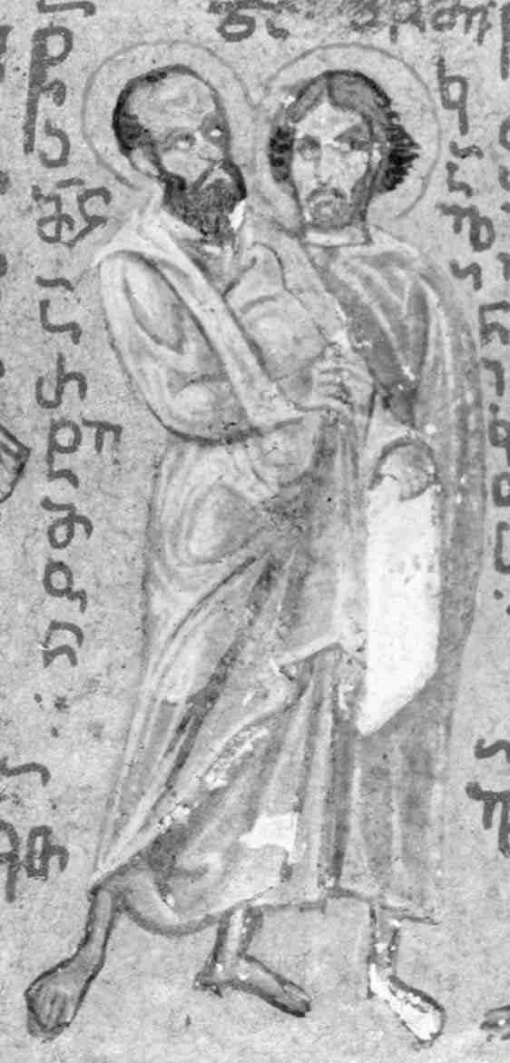 Arphema kalinnik.jpg: Апостол Арфема та мученик Калінік